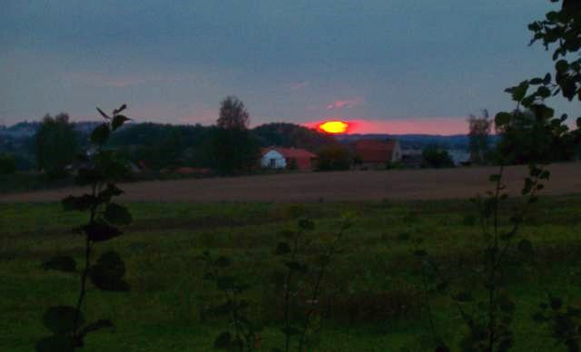 Tuchlovice-Srby, pohled na Srby ze směru od Kamenných Žehrovic při romantickém západu Slunce ;-)